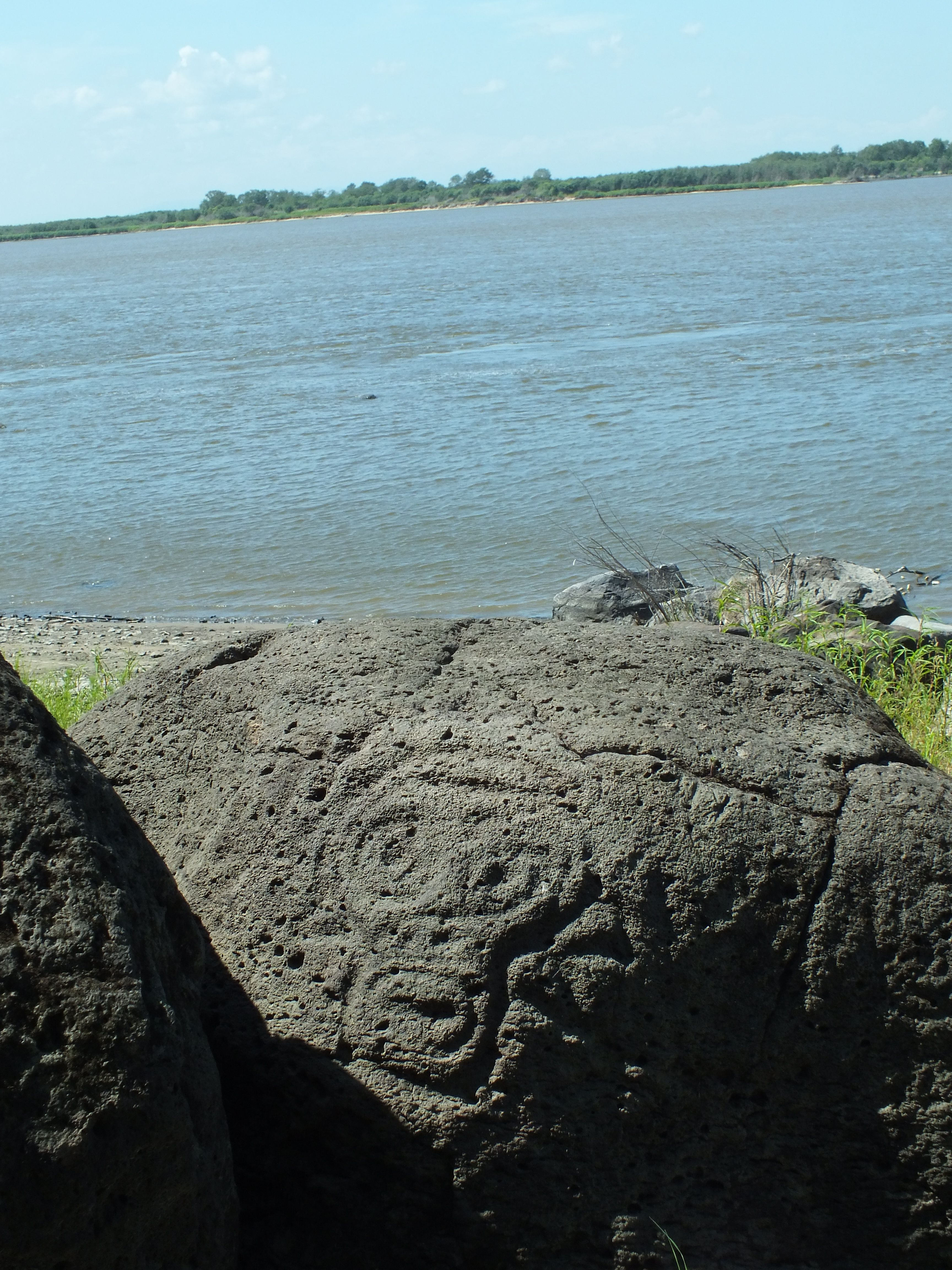 Petroglif of Sikachi-Alyan